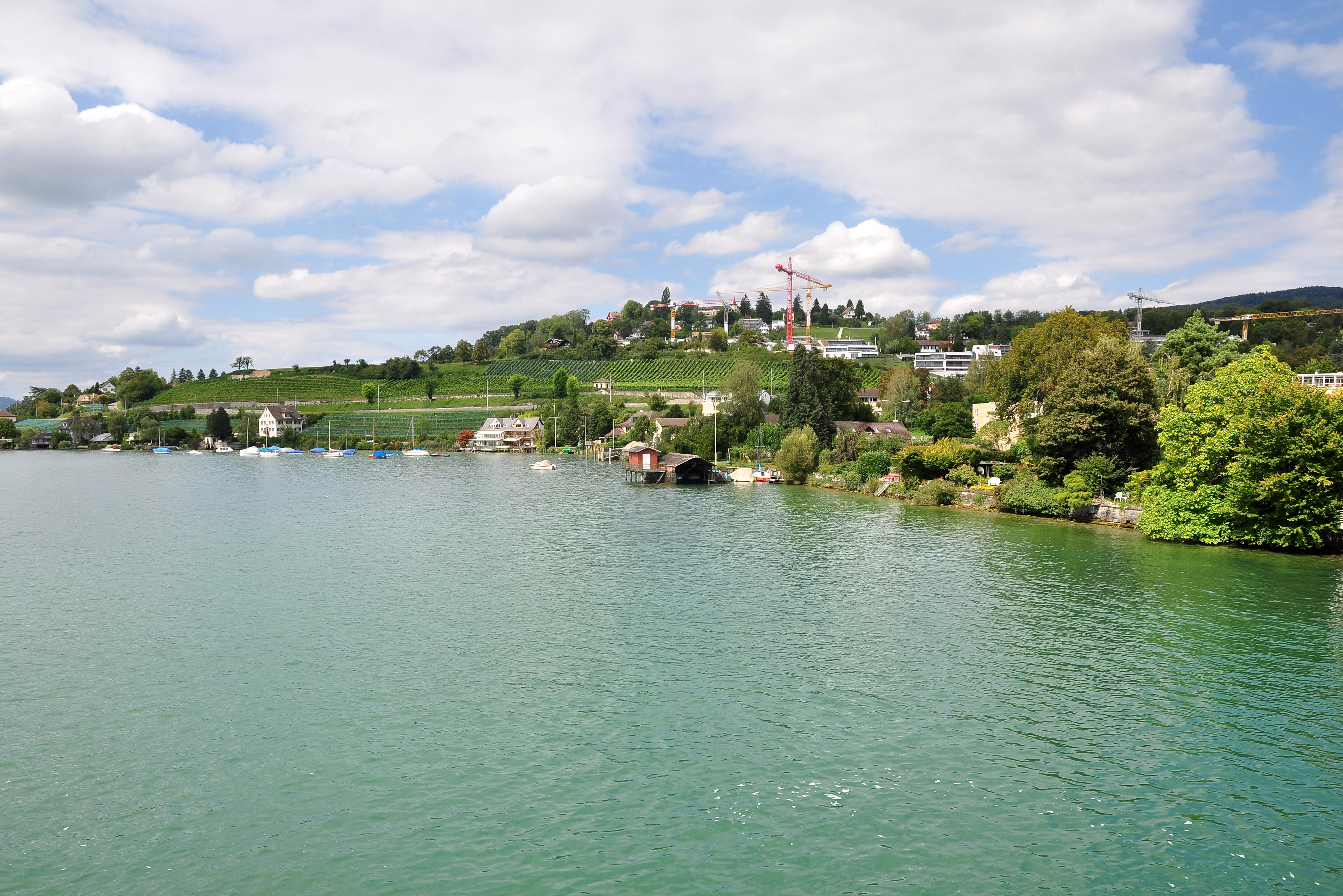 Rohrenhab, Uferzone, neolithische und frühbronzezeitliche Seeufersiedlungen in Meilen (Switzerland)